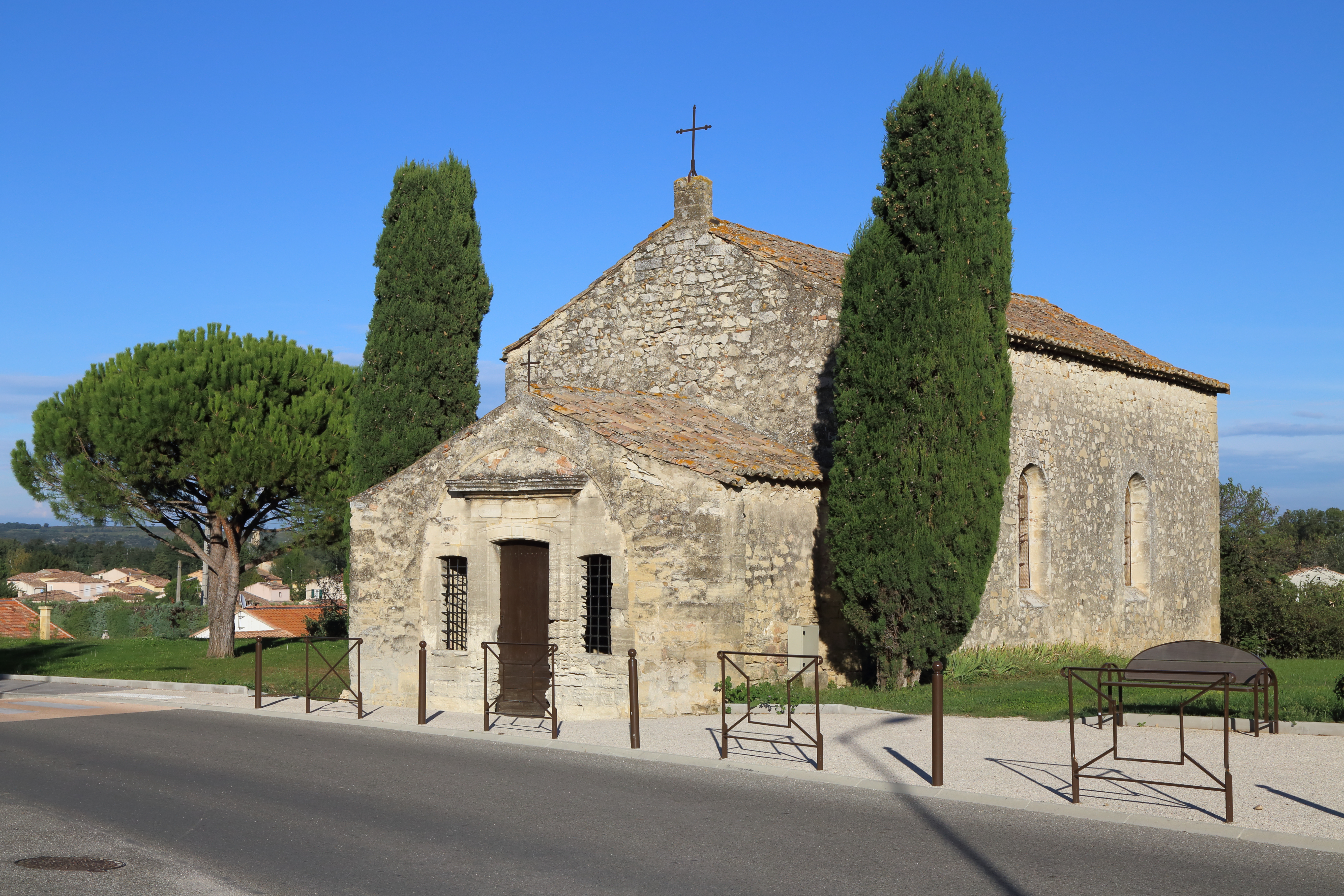 Eglise près de Roquemaure.